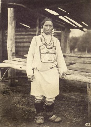 Женщина в традиционном костюме и украшениях. Чуваши. Ульяновская обл. (Симбирская губ.). 1871-1878 гг.